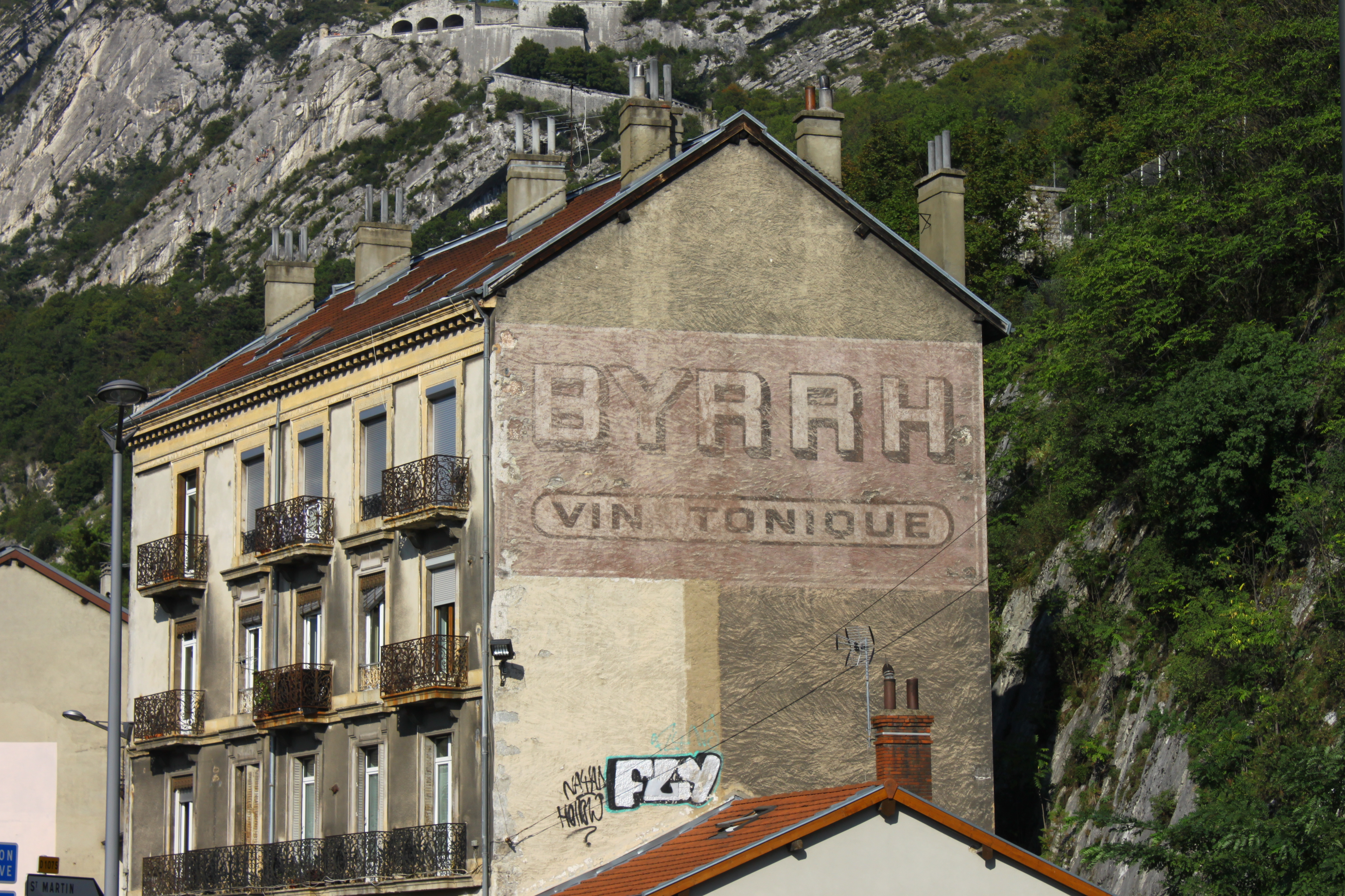 Ancienne publicité pour le spiritueux Byrrh sur une façade d'immeuble à Grenoble.